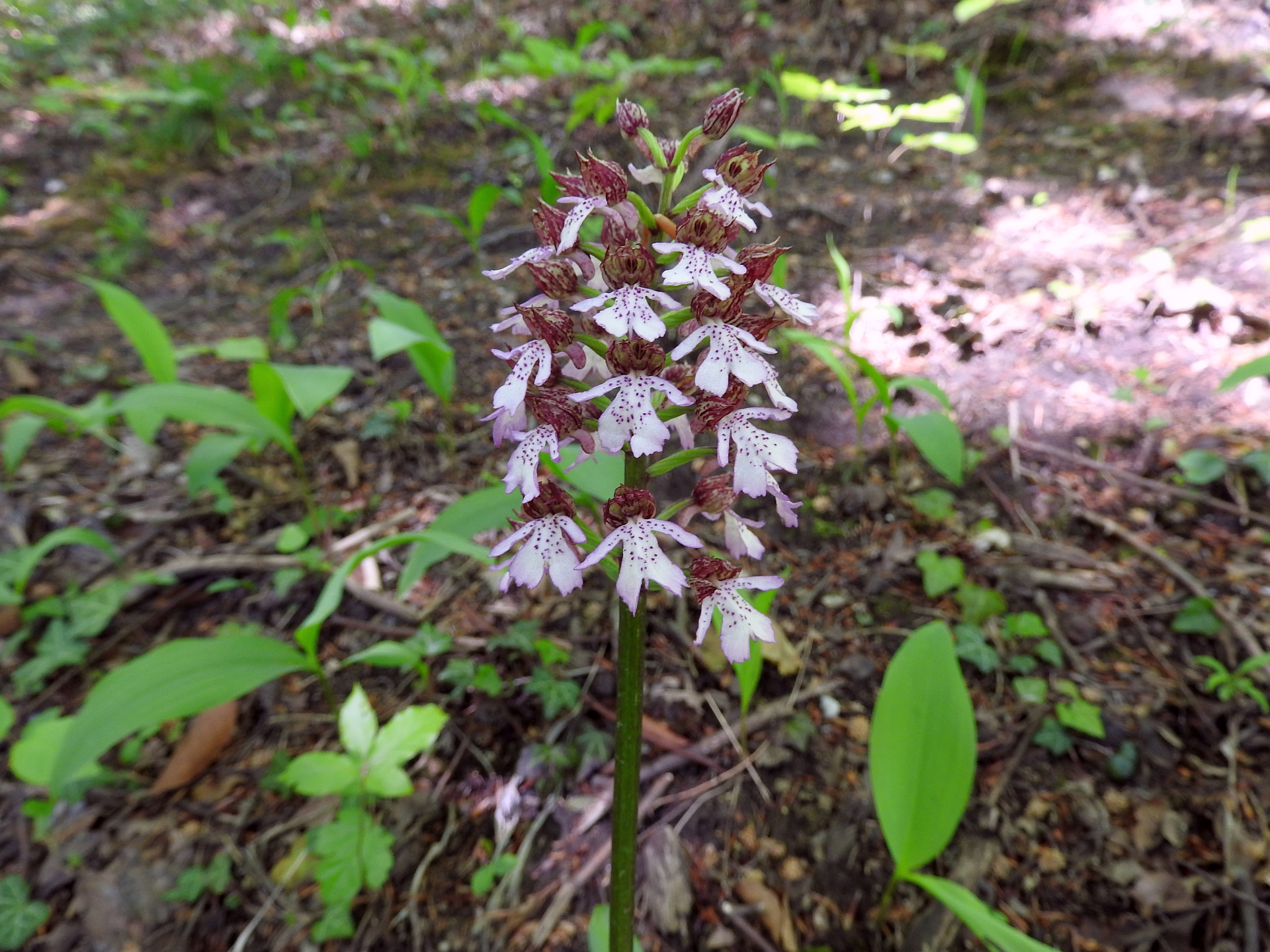 Purpur-Knabenkraut (Orchis purpurea), Weingarten (Baden), Ungeheuerklamm, 05.05.2016